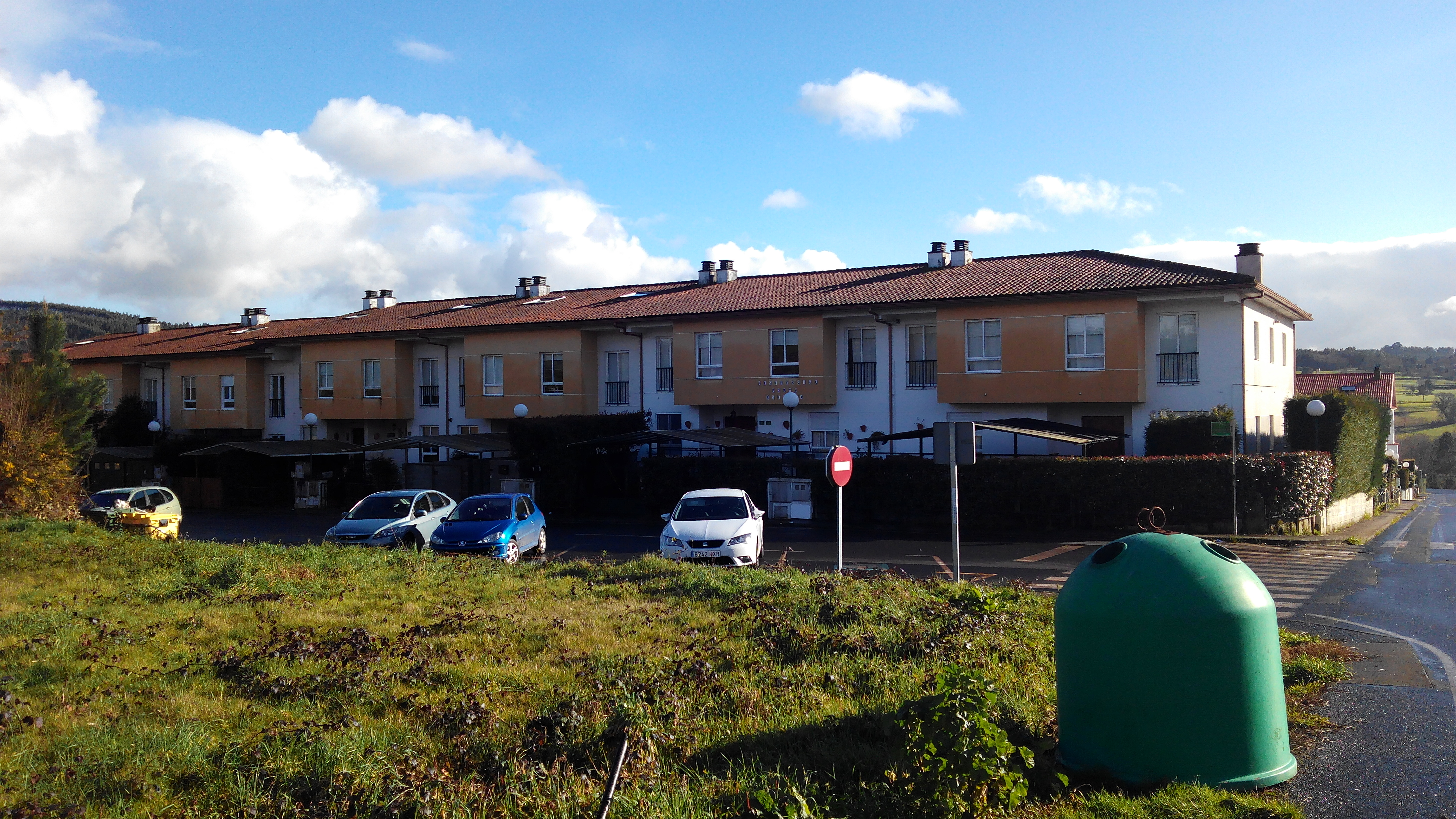 fwefefwefg